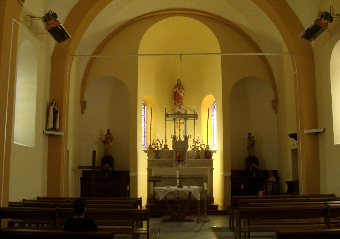 L'église de Beaufin, vue d'ensemble de la nef depuis la porte. Le chœur est divisé en trois alvéoles, visibles dans la structure extérieure (cf. File:Église de Beaufin-85.JPG).